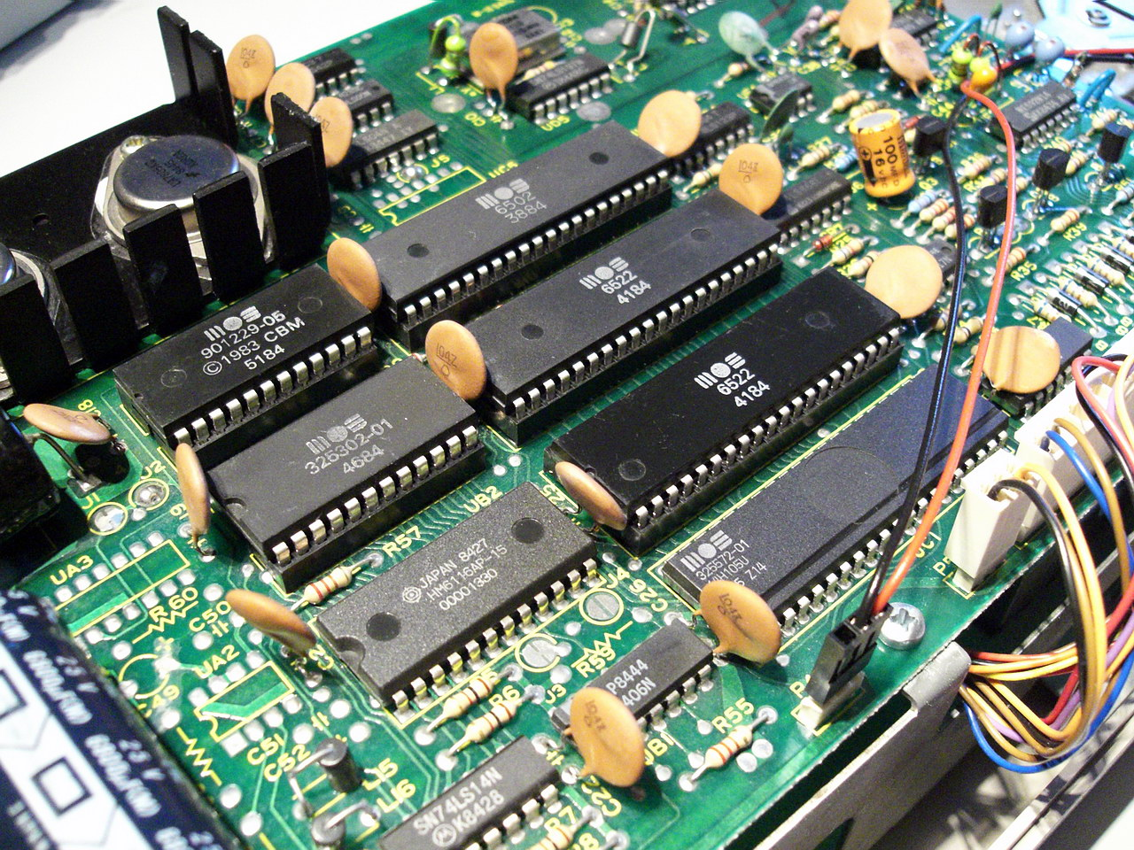 Commodore VC1541 Diskettenlaufwerk Mainboard Nahaufnahme